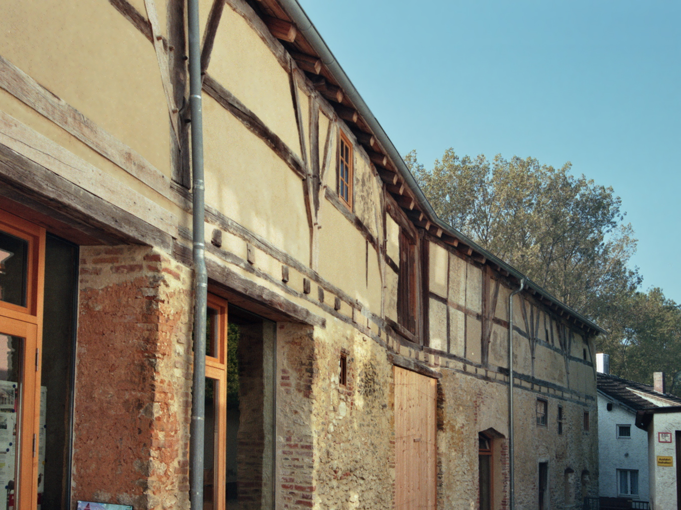 Dollnstein, Altmühltal, Bayern: Reste der unteren Burganlage 2011. Diese Sanierung und Restaurierung erhielt 2010 in der Kategorie Öffentliche Bauwerke den Bayerischen Denkmalpflegepreis in Gold.